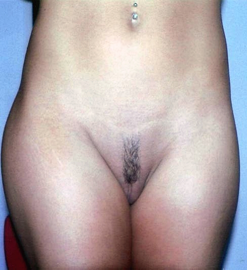 Irokesenhaarschnitt (Intimfrisur)